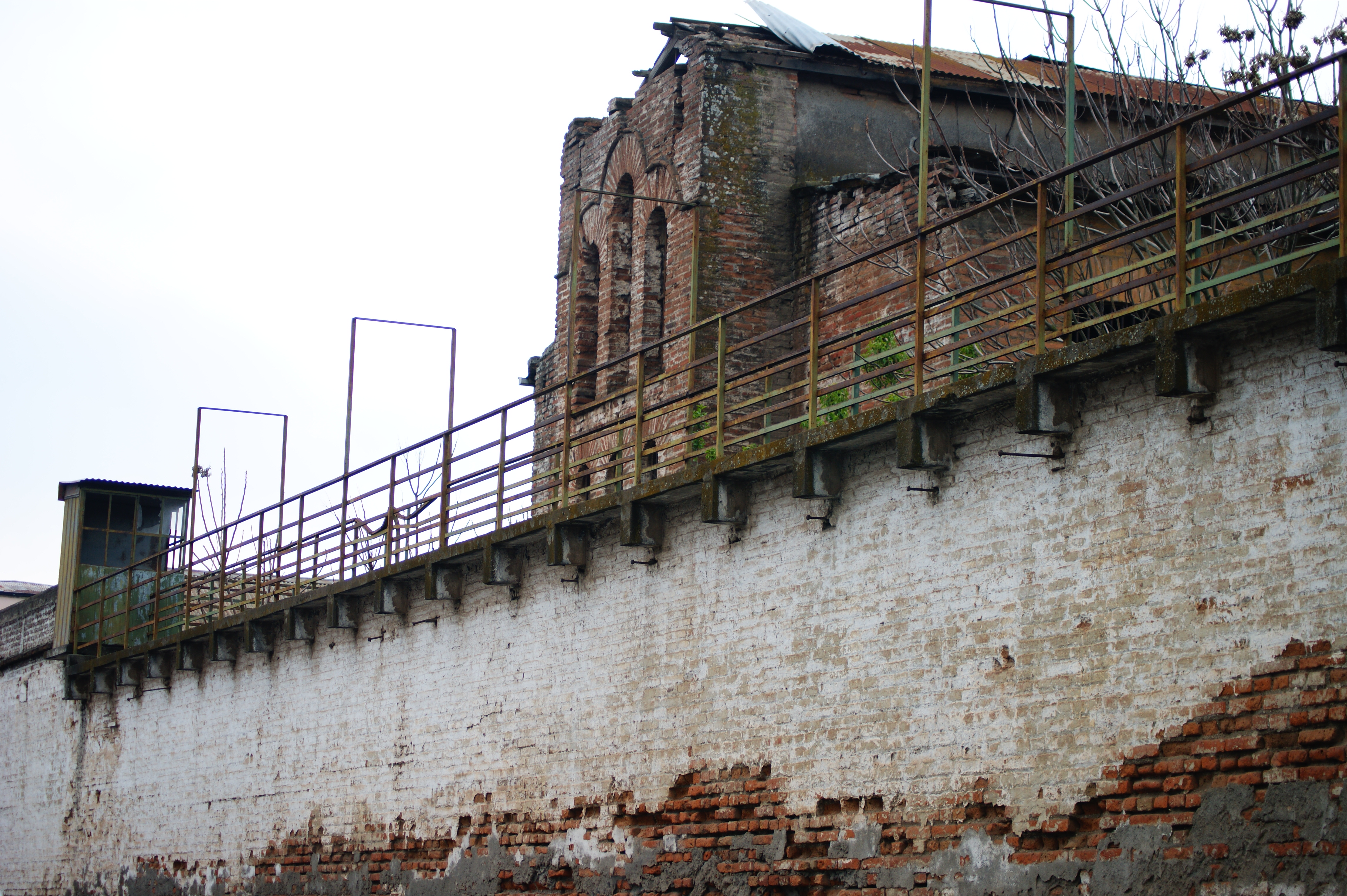 Ubicada en la comuna de San Fernando, en la región de O'higgins.